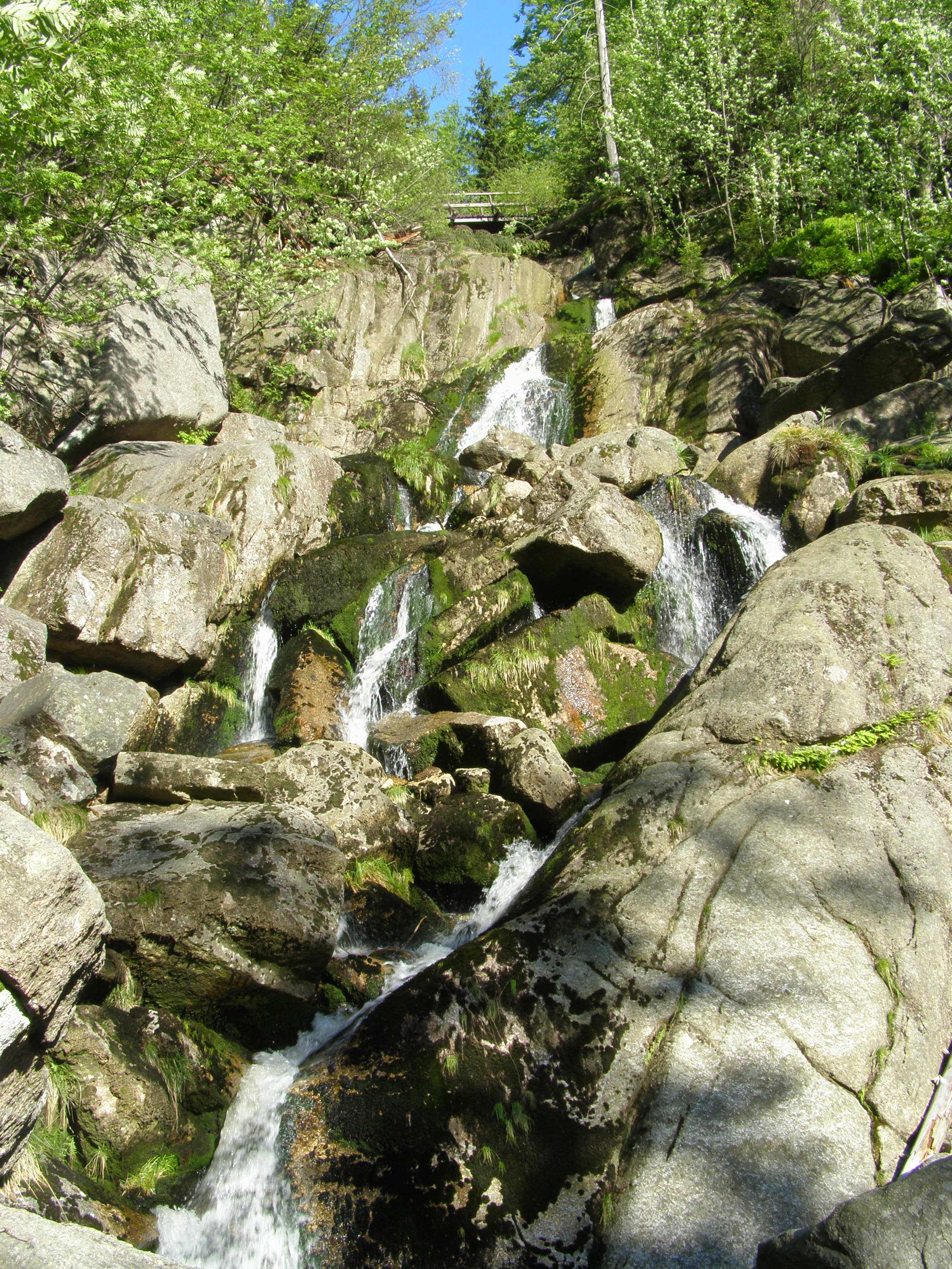 Česky: Jizerské hory, Smědavská hornatina, Sloupský potok, vodopád Velkého Štolpichu